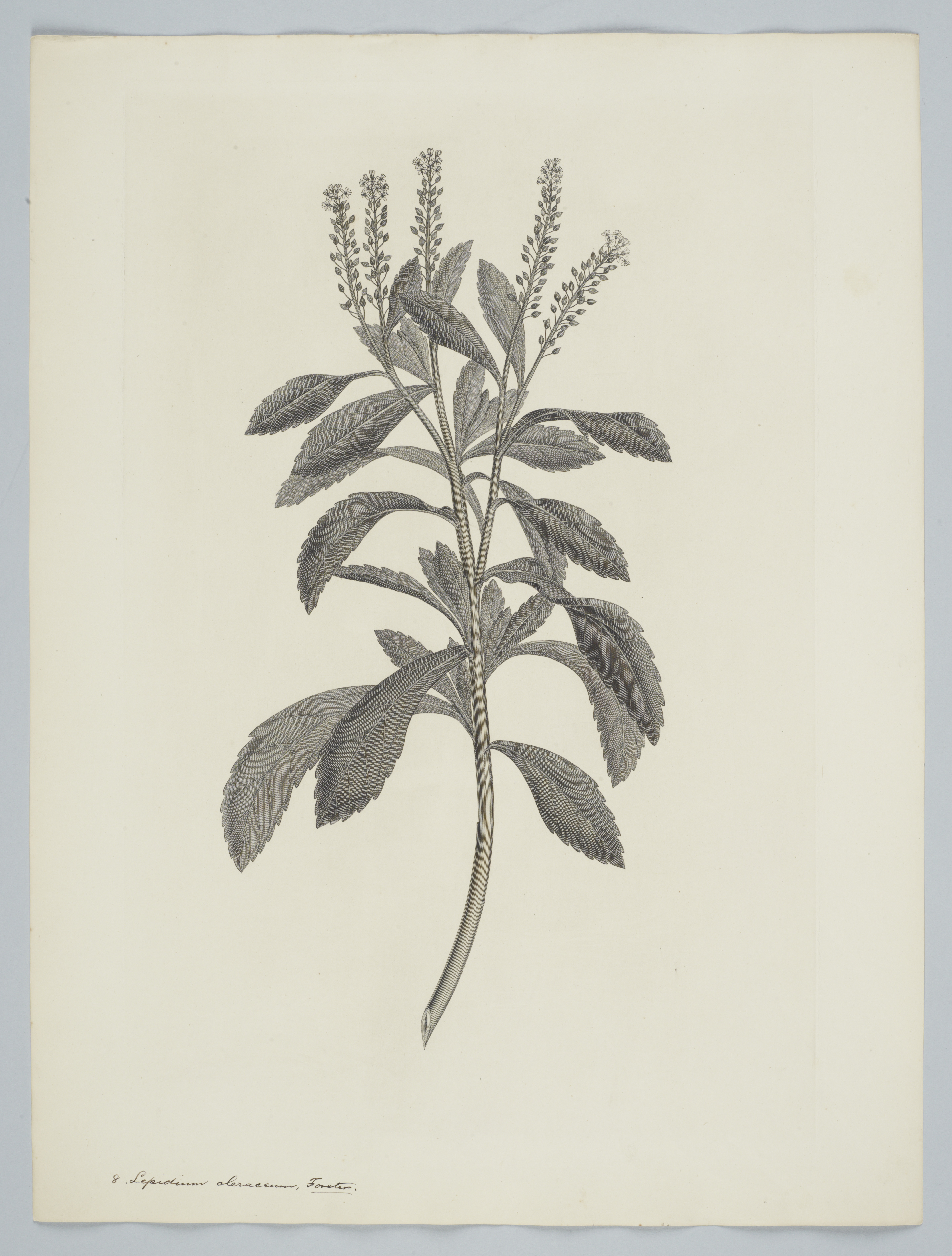 Lepdium oleraceum, o "hierba del escorbuto de Cook·, grabado de MacKenzie a partir de acuarela de Frederick Nodder basada en un dibujo a lápiz de Sydney Parkinson que éste realizó en Mercury Bay durante el viaje a Nueva Zelanda del HMB Endeavour capitaneado por James Cook.